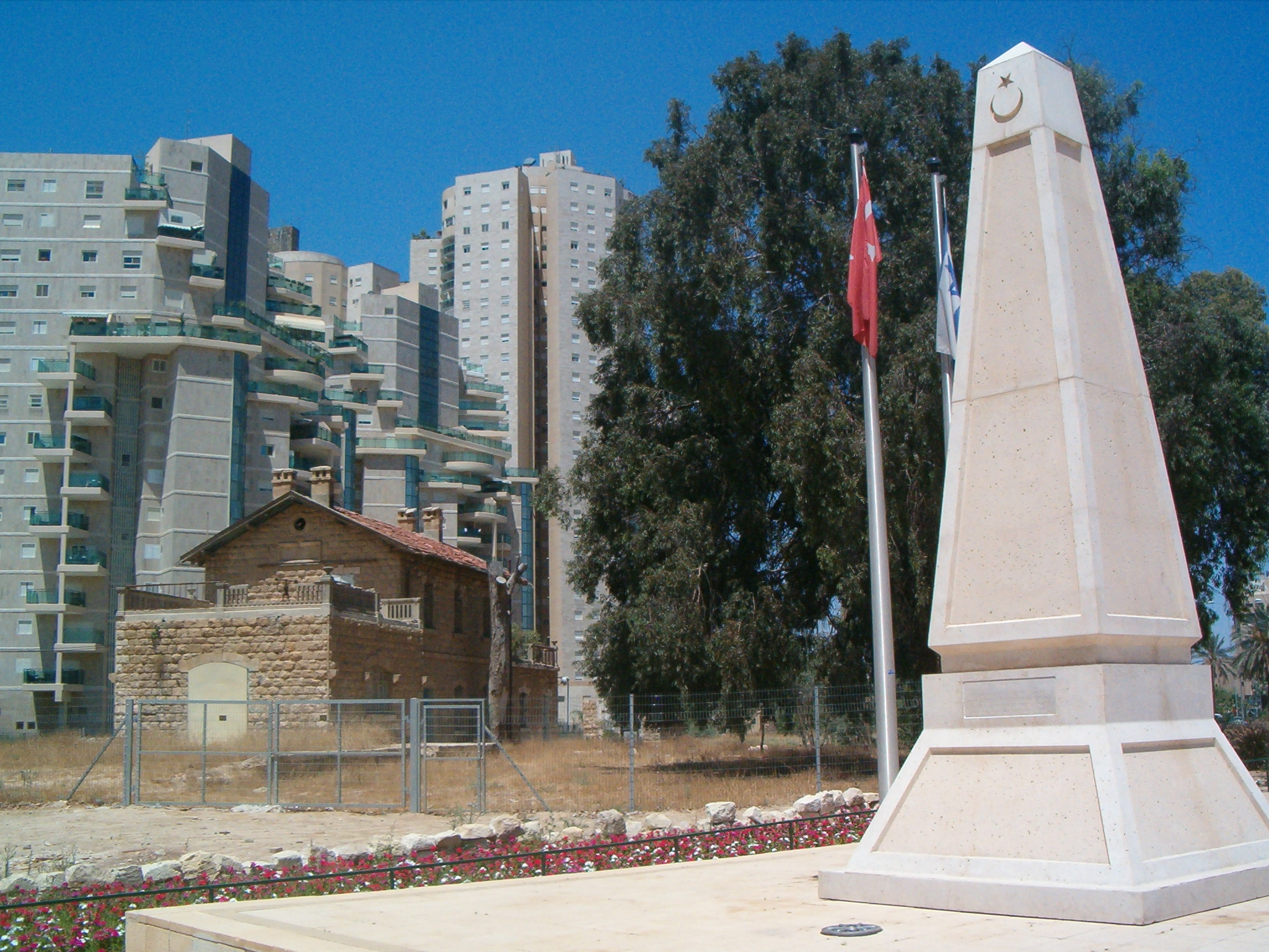 האנדרטה לזכר חיילי he:צבא האימפריה העות'מאנית שנפלו בhe:מלחמת העולם הראשונה בקרבות על באר שבע, הנמצאת בסמוך לתחנת הרכבת הטורקית בבאר שבע